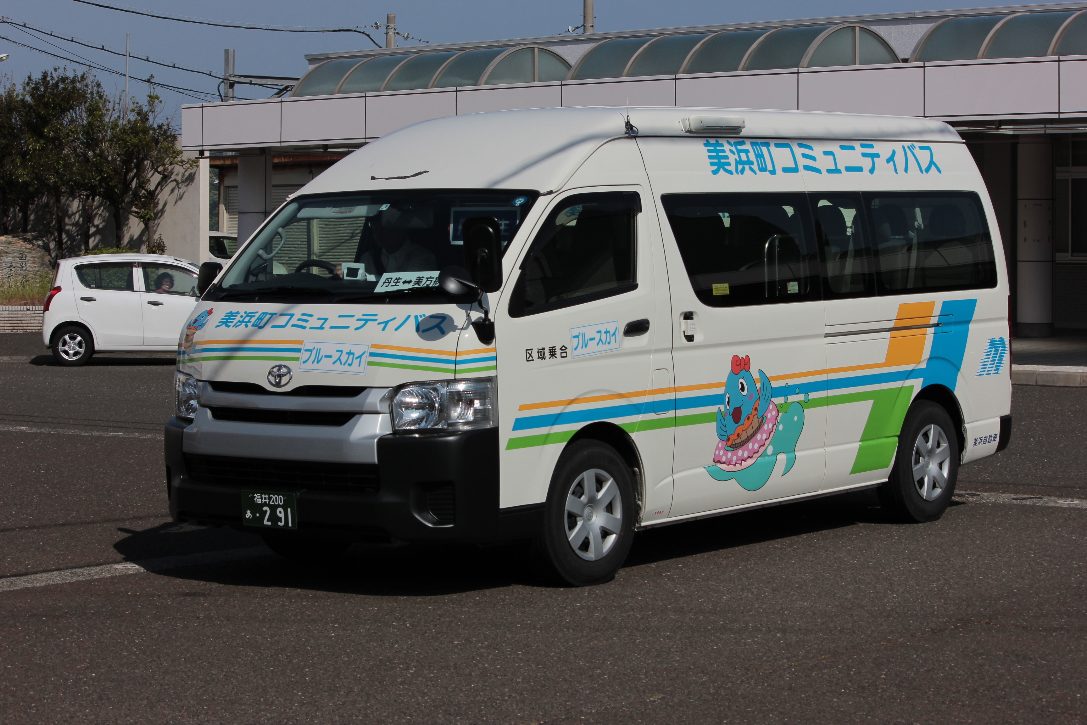 福井県三方郡美浜町のコミュニティバス「ブルースカイ」 Canon EOS Kiss X5